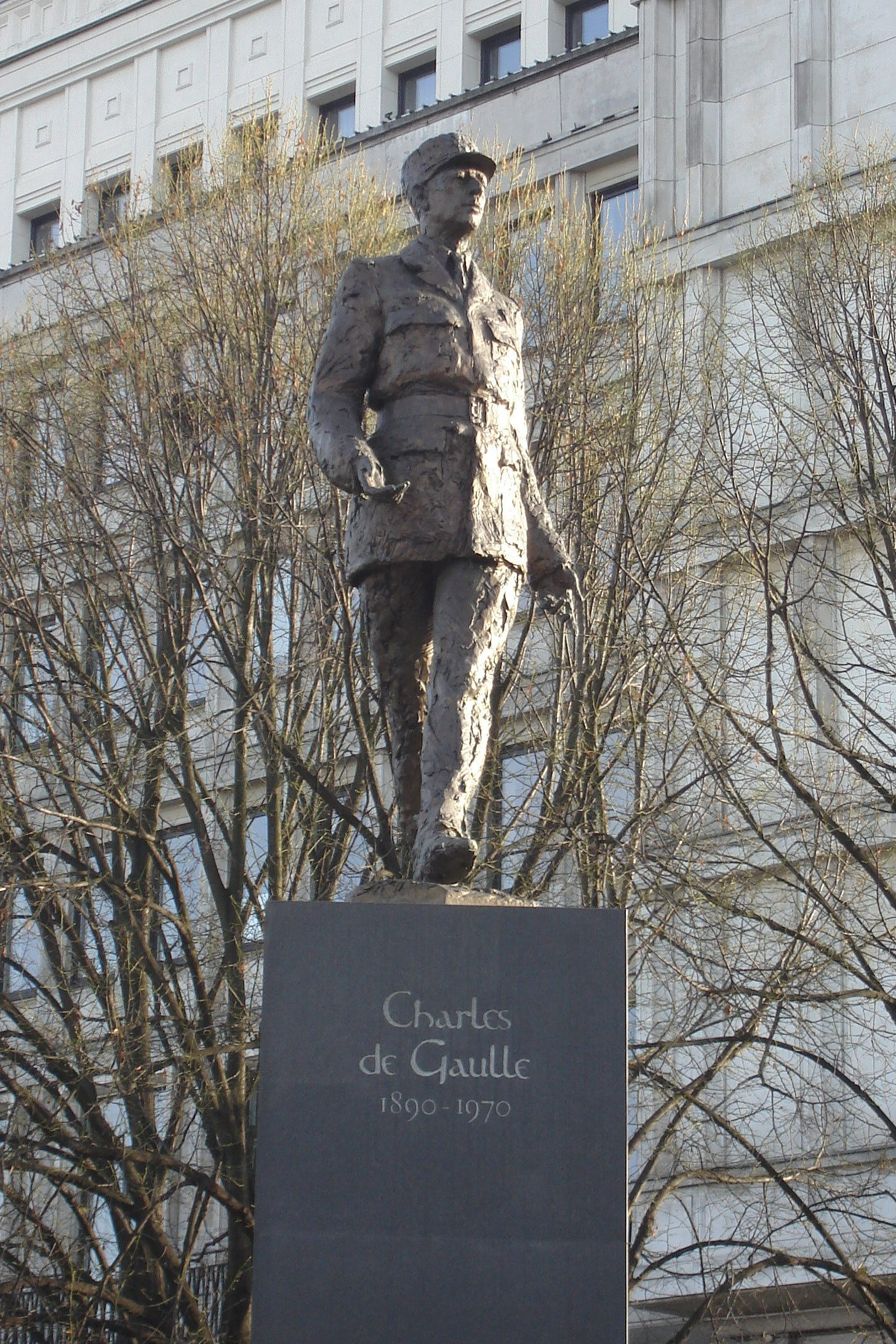 Pomnik upamiętniający prezydenta Francji Charles'a de Gaulle'a. Lokalizacja: Warszawa. Sculptor: Jean Cardot